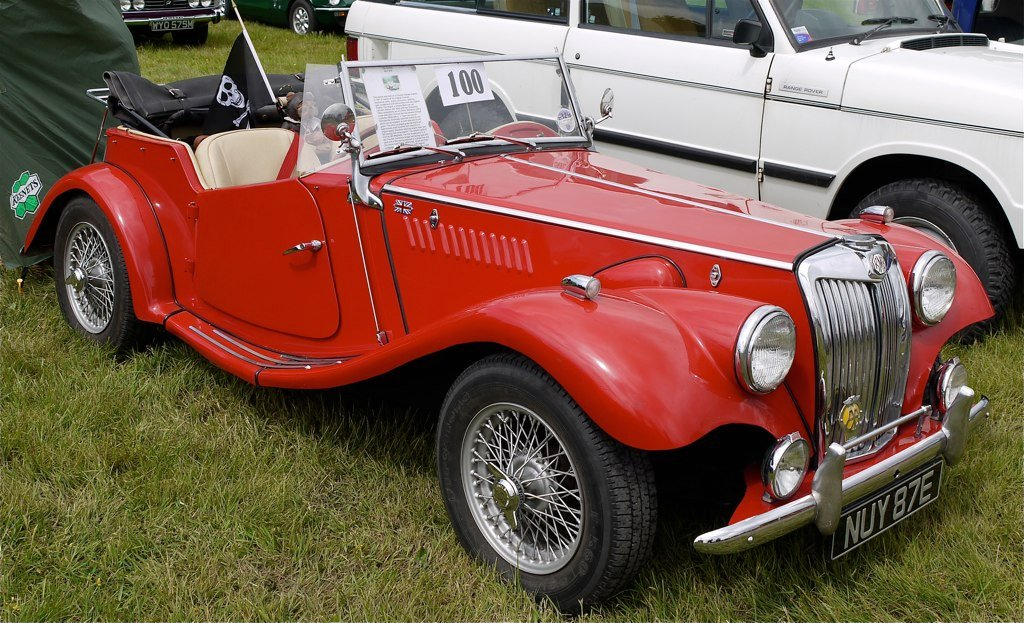 Panasonic G1 14-45 Lens